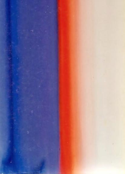 Peinture acrylique sur toile 130 x 90